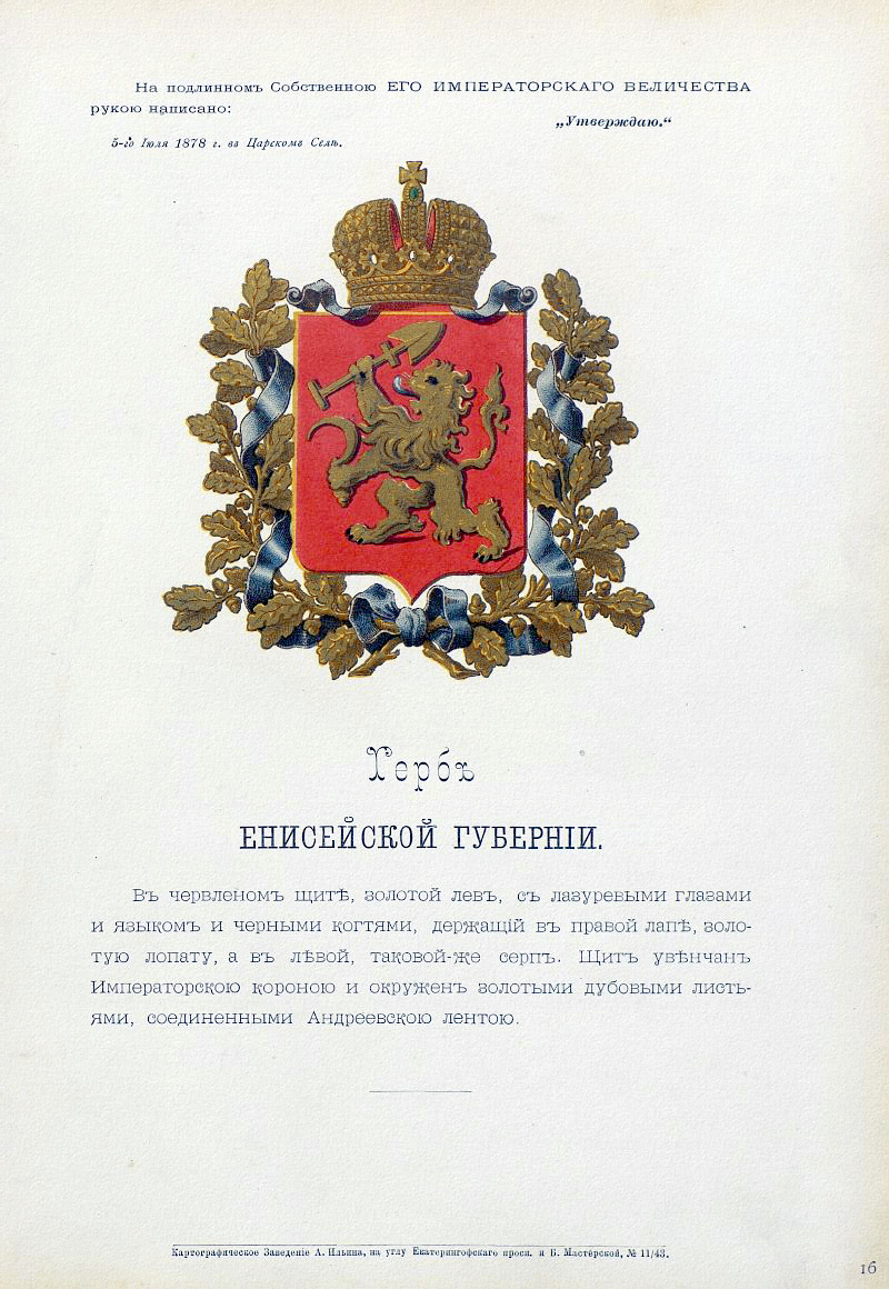 Official Russian Empire coat of arms Enisei Governorate. Герб Российской Империи Енисейской губернии с официальным описанием в Гербовнике Бенке. Утверждён Императором Всероссийским Александром Вторым.